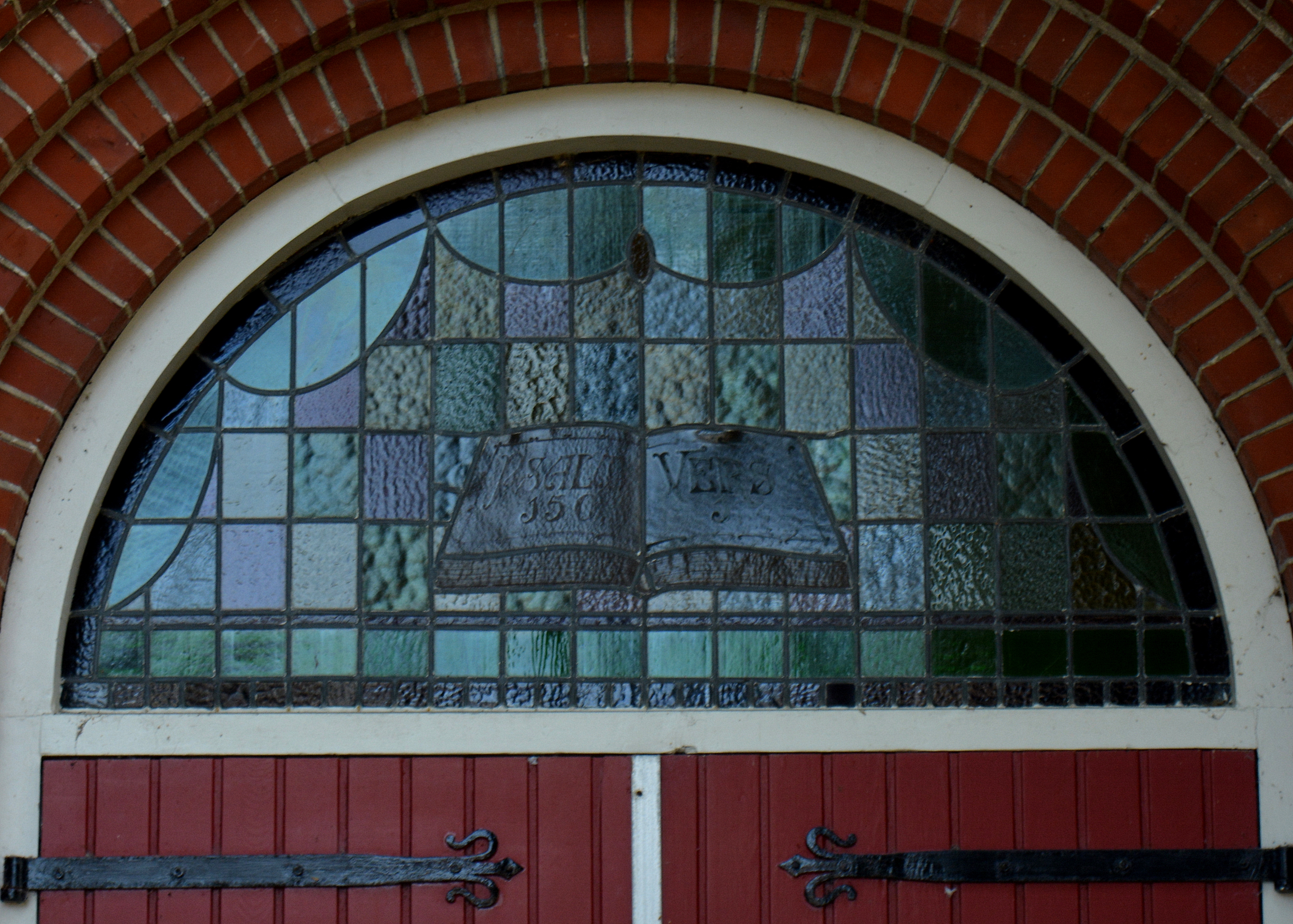 Opende, gereformeerde kerk, glas-in-loodraam